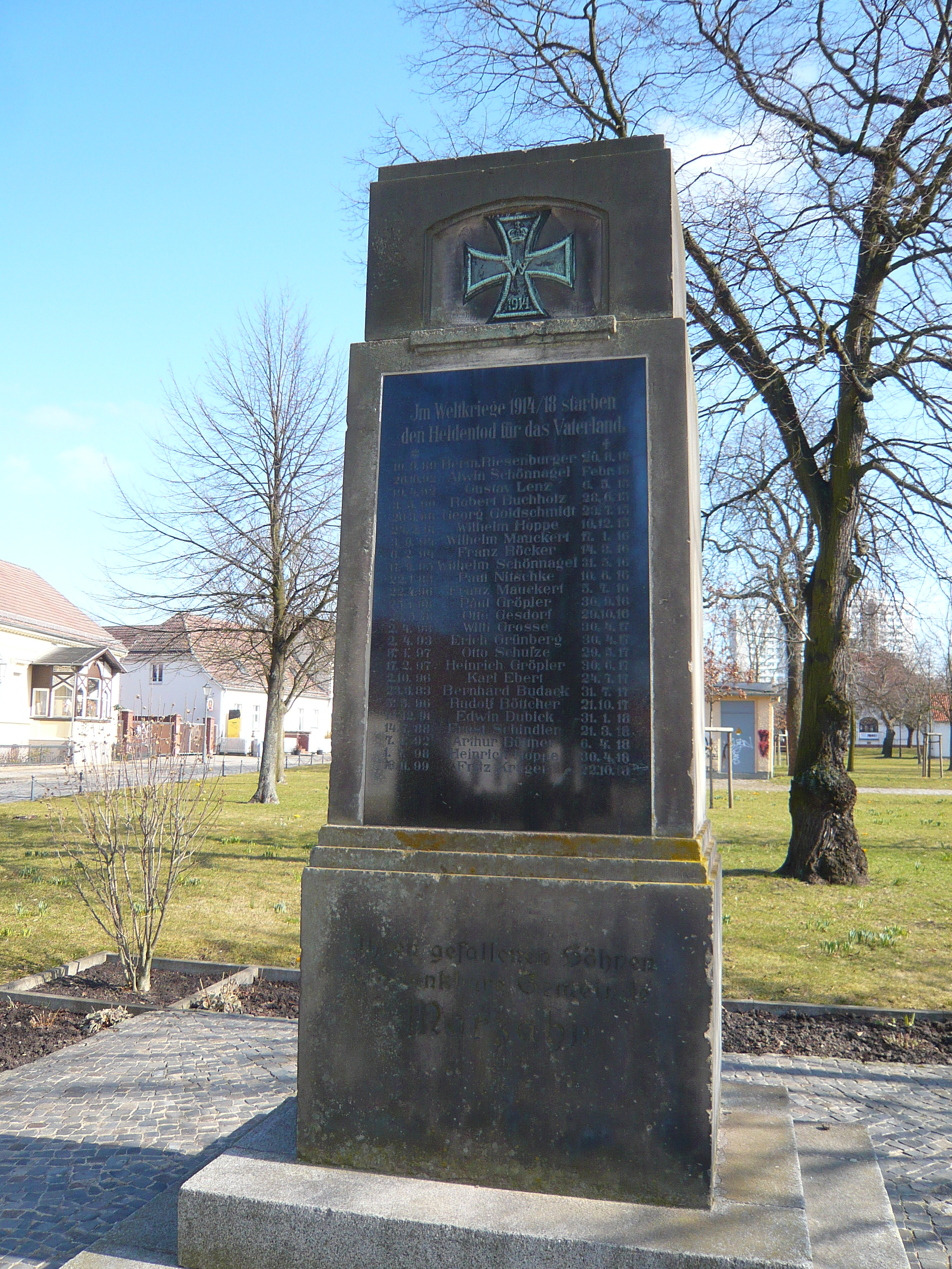 Ortsteil Marzahn, Kriegerdenkmal am Anger